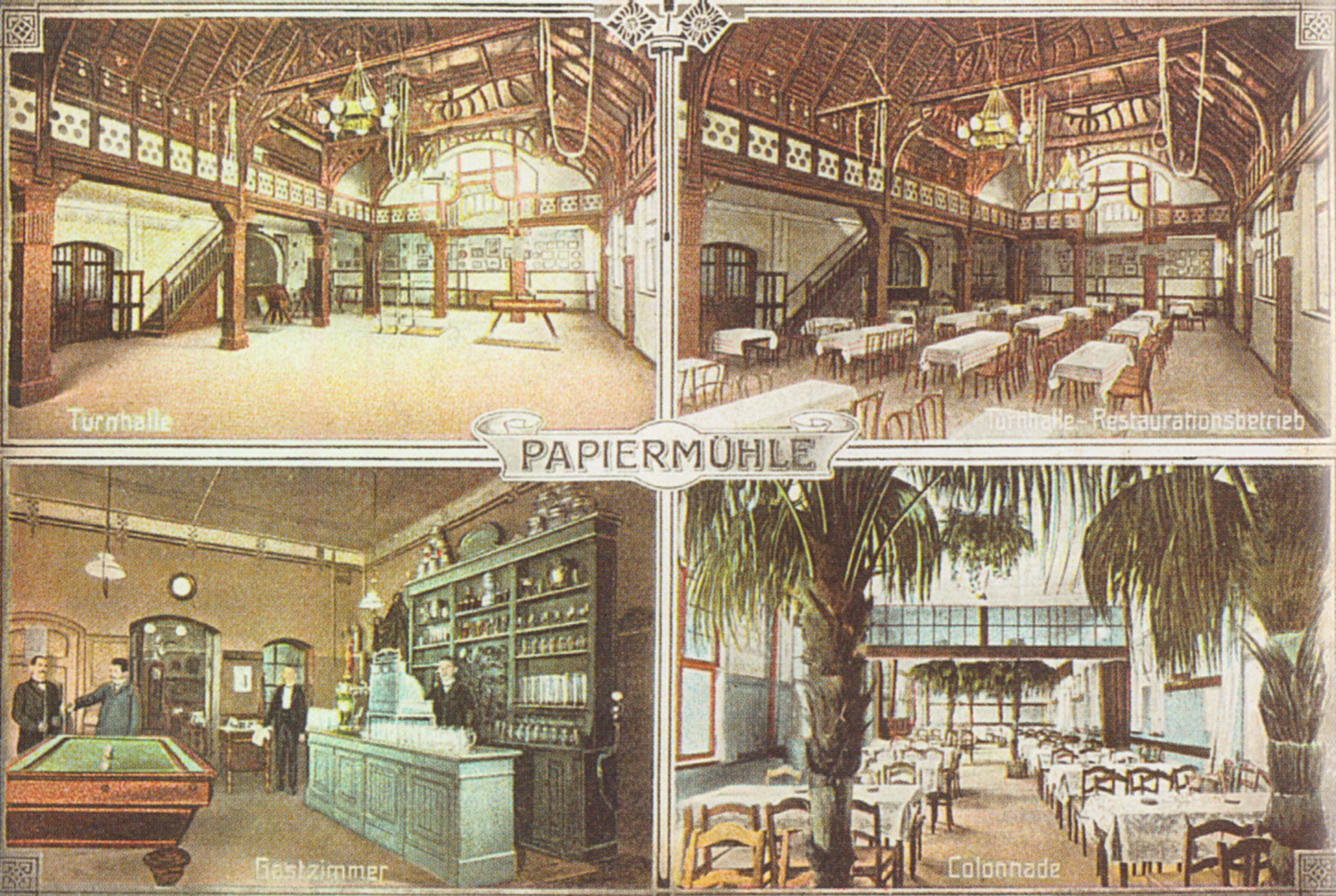 Ansichtskarte des „Concert & Balletablissements Papiermühle“ in Stötteritz bei Leipzig um 1905